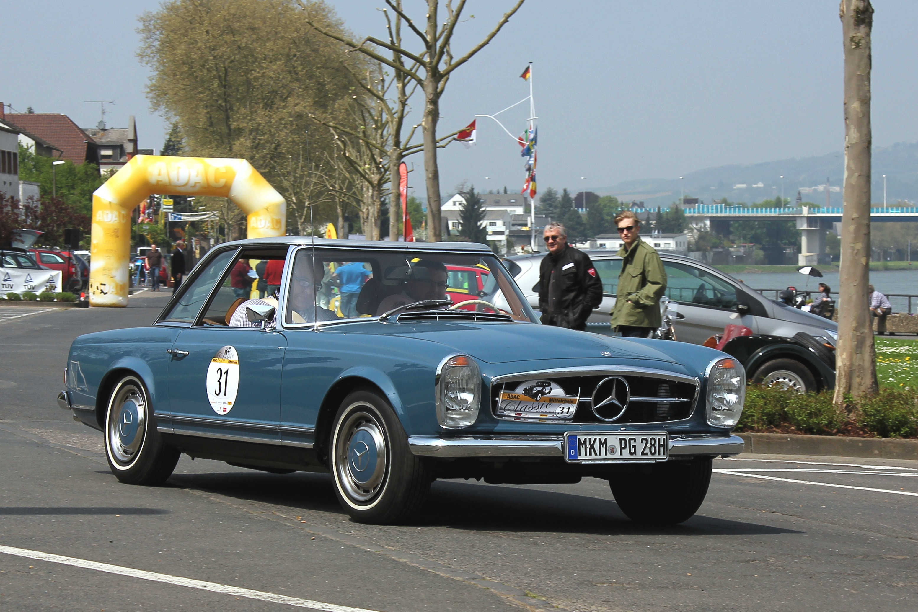 Mercedes-Benz 280 SL (W 113), Baujahr 1969, bei der ADAC Mittelrhein Classic 2013; amtliches Kennzeichen verändert